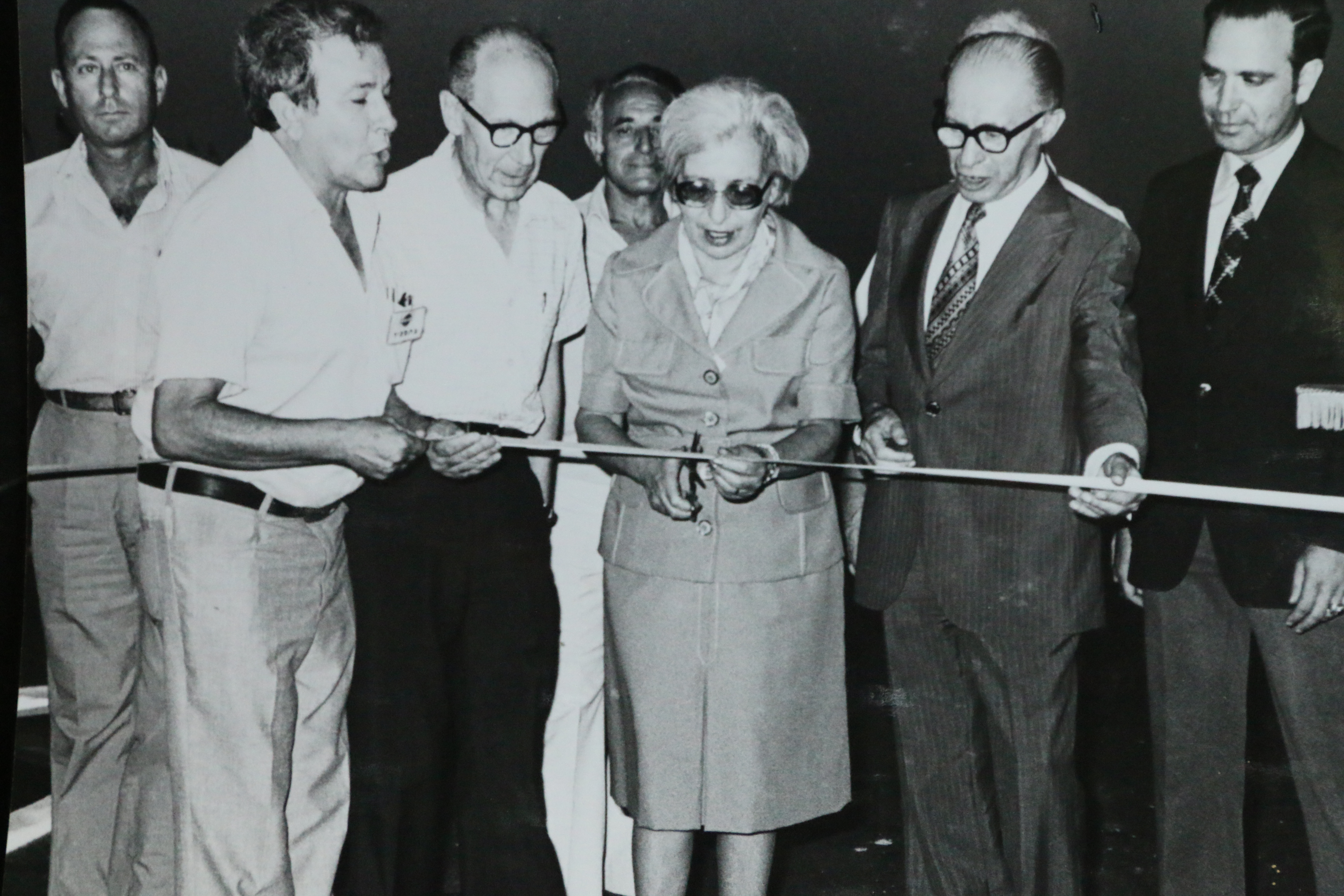 ראש הממשלה מנחם בגין ורעייתו עליזה מתכבדים לגזור את הסרט בטקס חגיגי לפתיחת כביש מספר 1 ביחד עם מארגן הטקס מר יהודה אילן ב1979